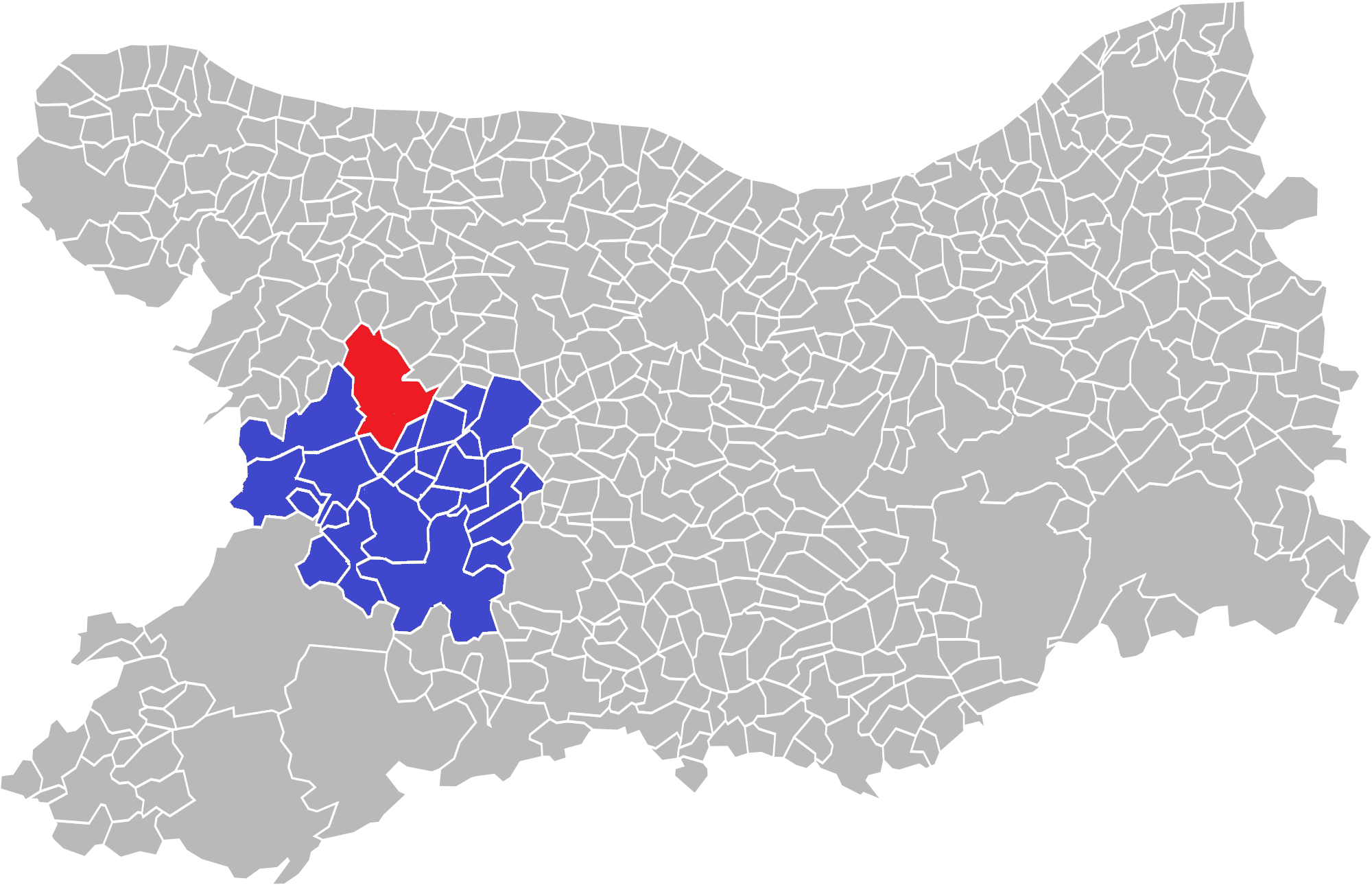 auseulles